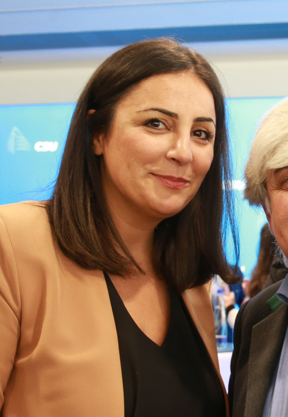 Düzen Tekkal, deutsche Fernsehjournalistin, Autorin, Redakteurin und Kriegsberichterstatterin. Hier während der ersten Landesversammlung des CSU-Arbeitskreises Integration und Migration (AK MIG) in der CSU-Landesleitung in München am 22. Oktober 2016. Titel des Werks: "Düzen Tekkal am 22.10.2016 in München (Bild-Nr. 1304)".